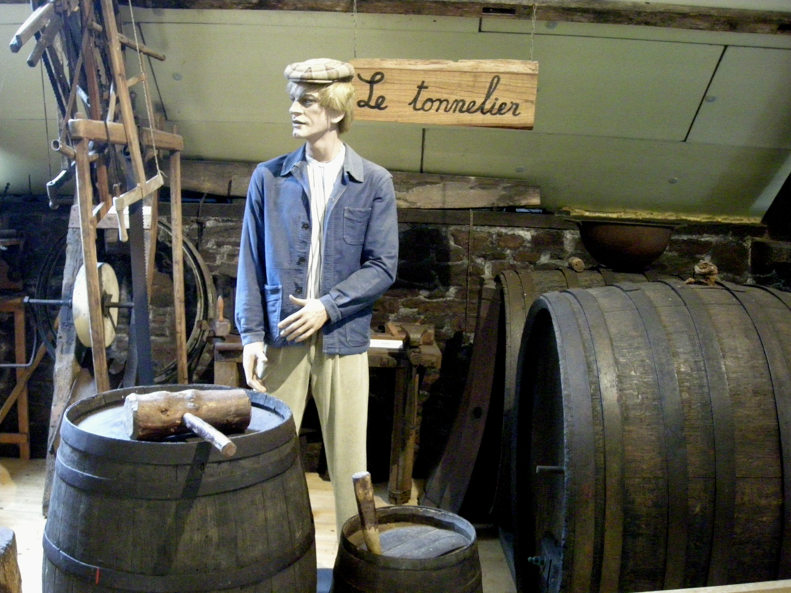 Le tonnelier au travail (scène de la vie rurale dans une ferme cidricole à Saint-Jean-des-Champs, département de la Manche, Normandie)